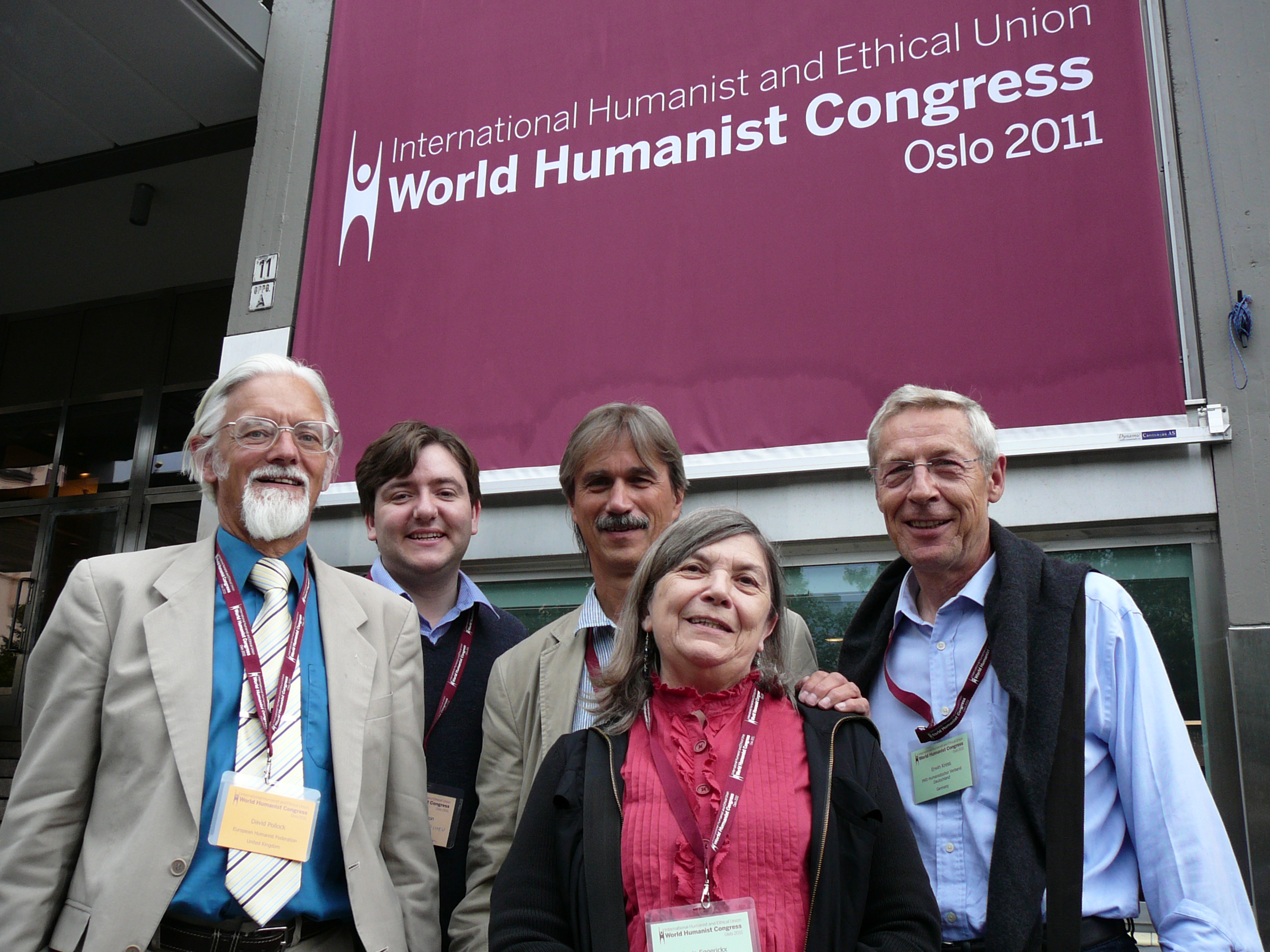 World Humanist Congress 2011 in Oslo: David Pollock, Andrew Copson, Werner Schultz, Sonja Eggerickx und Erwin Kress (v.l.)